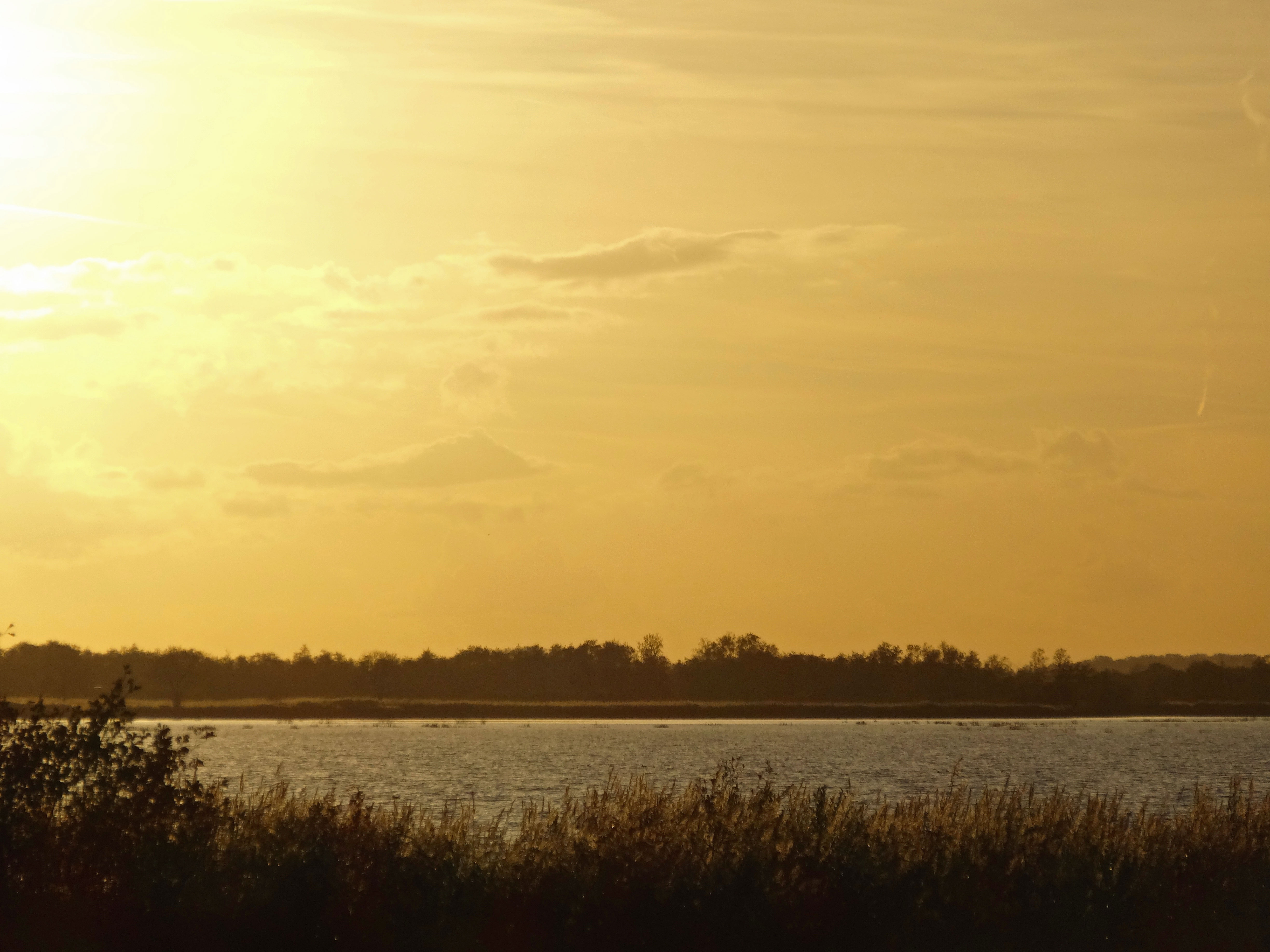 Schutsloterwijde, gezien vanaf de Blauwehandseweg